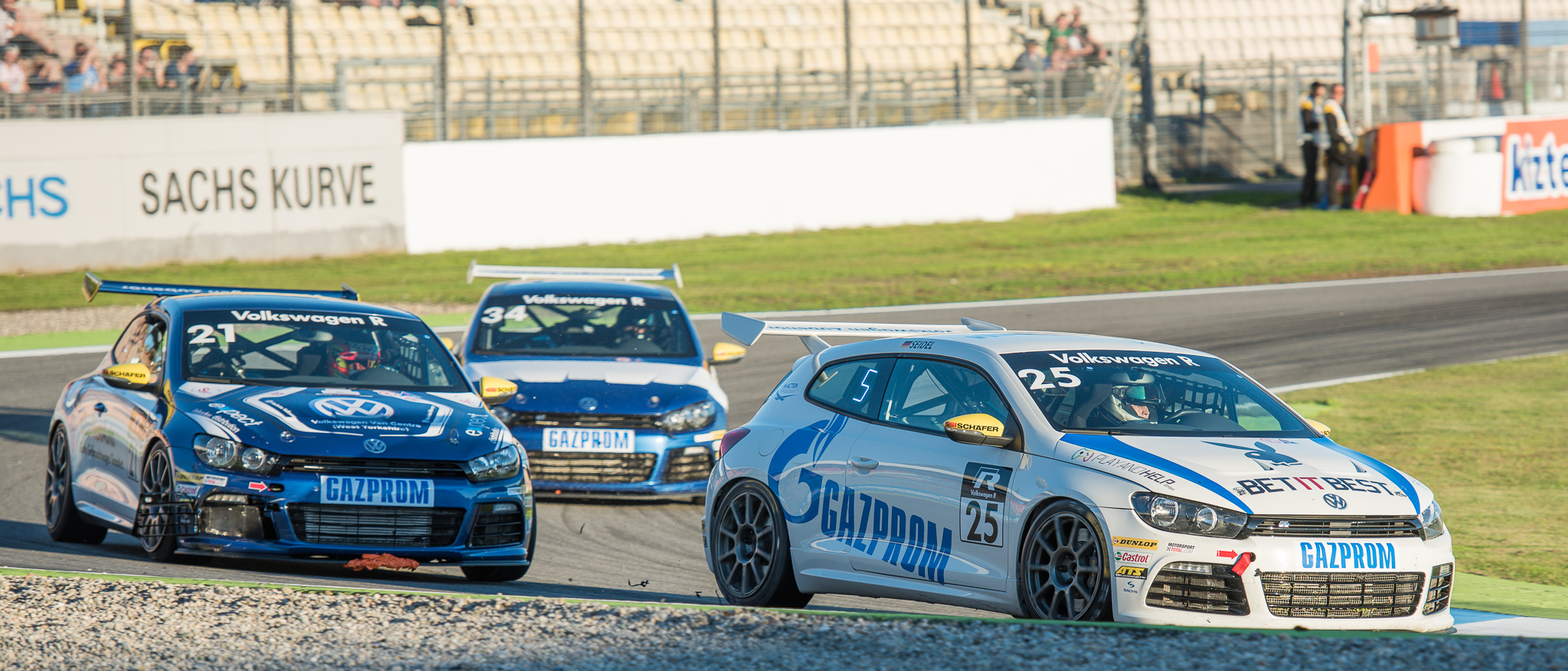 Albert von Thurn und Taxis,DTM,Deutsche Tourenwagen Masters,Doreen Seidel,Hockenheimring,Josh Caygill,Motorsport,VW Scirocco R-Cup,Volkswagen Scirocco R-Cup